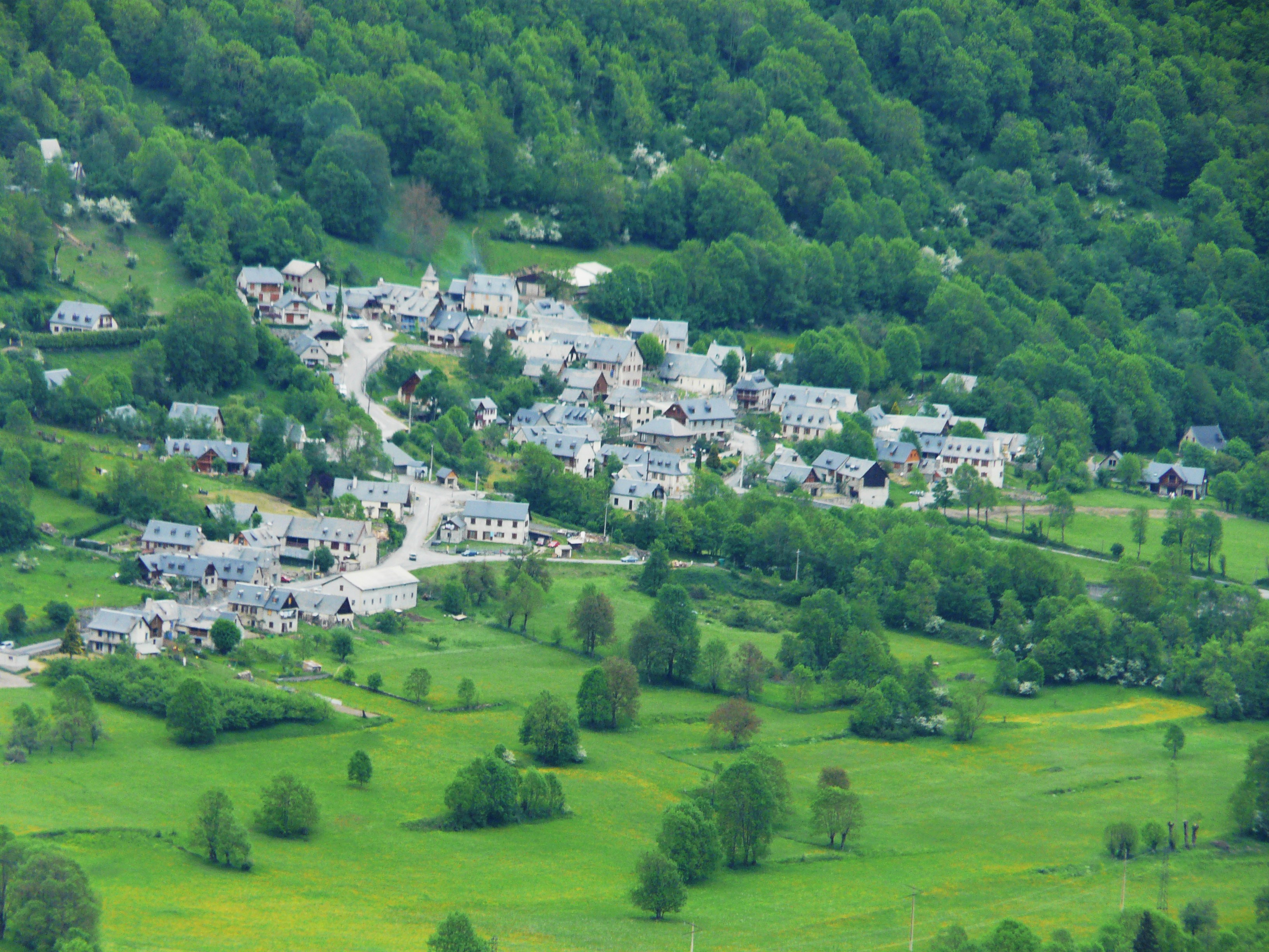 Le village de Vielle-Louron, Hautes-Pyrénées, France. Vue prise depuis le village de Loudervielle.